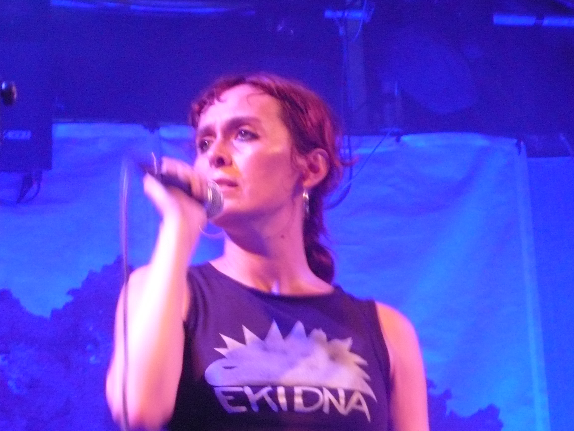 Betty Vezzani live a Villa Ada, a Roma